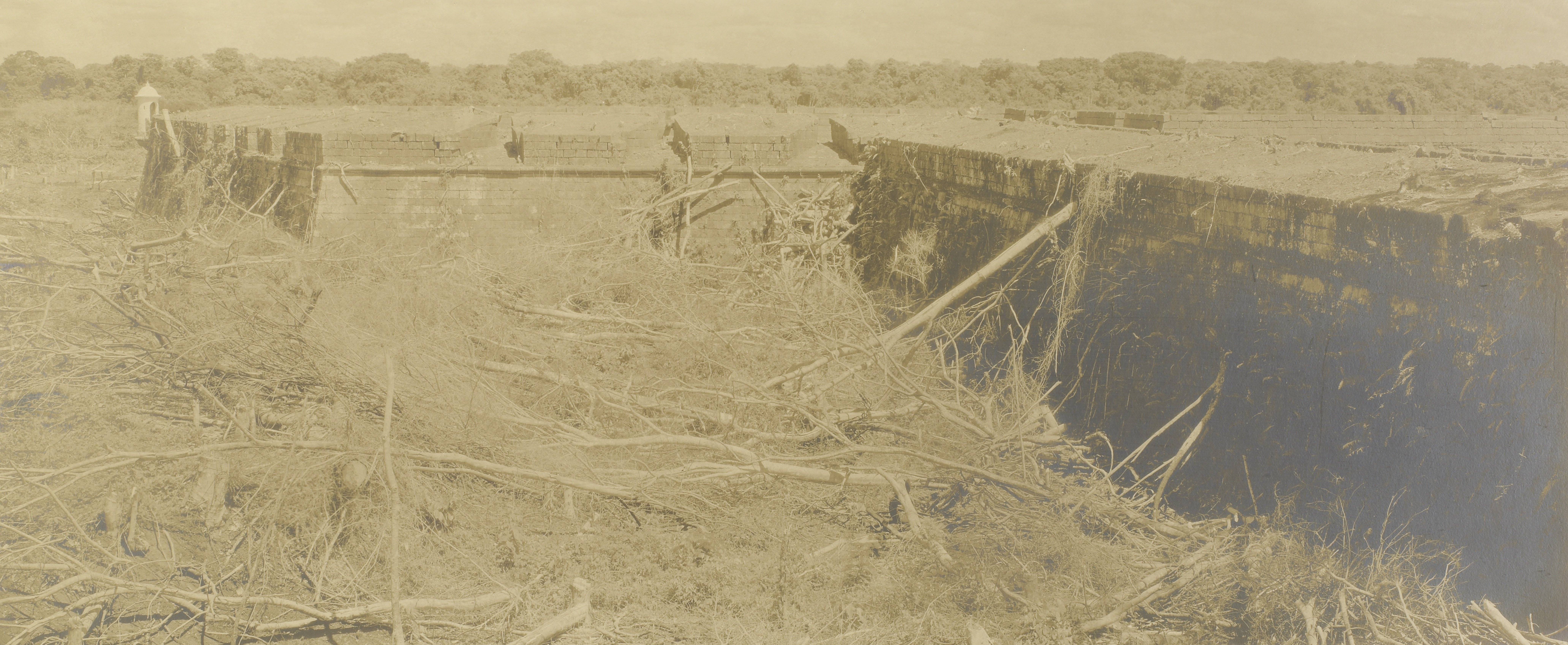 Imagem do Fundo Ministério da Guerra, do Arquivo Nacional